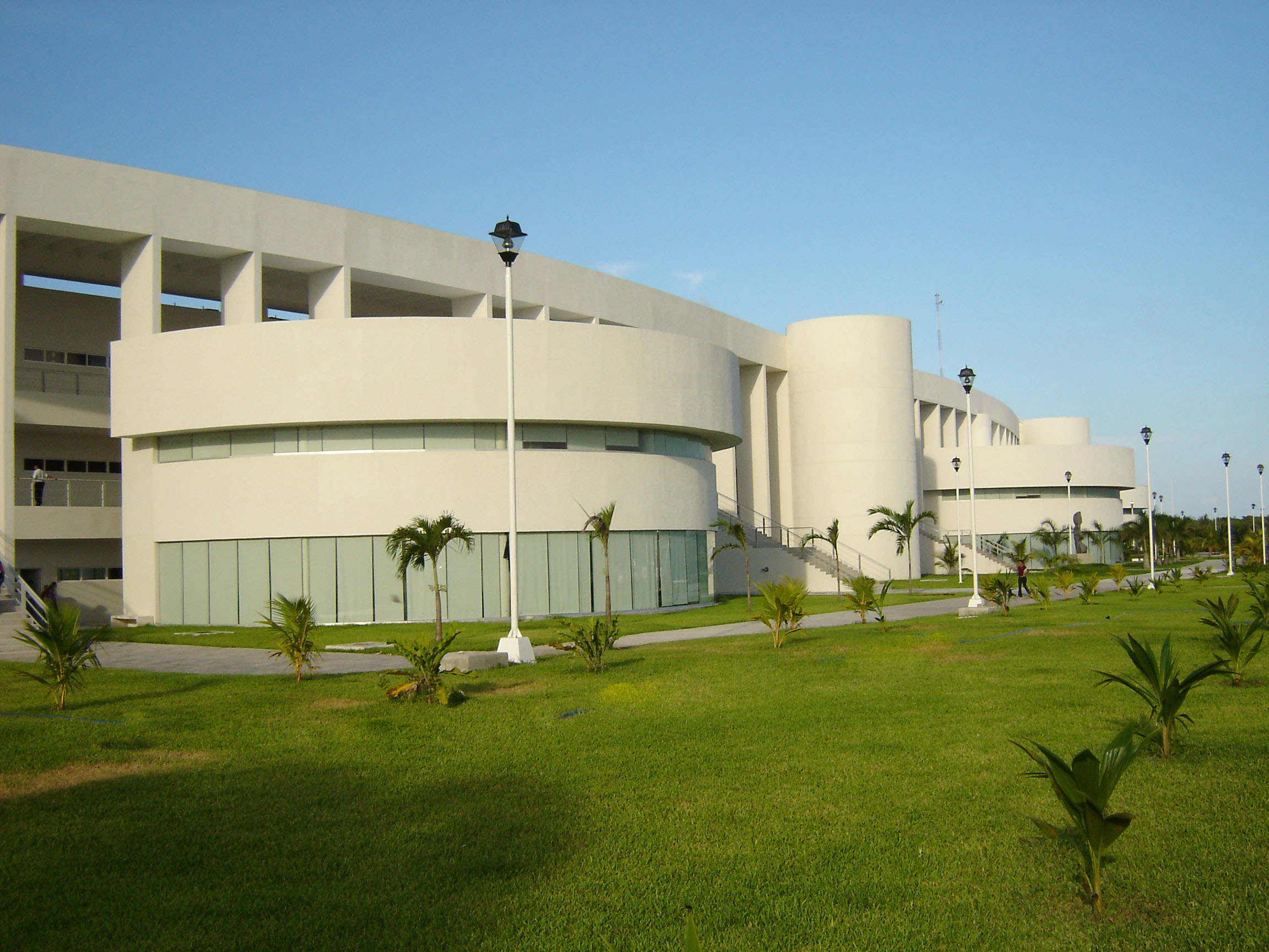 Paisaje de los tres edificios administrativos de la universidad del caribe teniendo en primer plano el de ciencias basicas e ingenieras